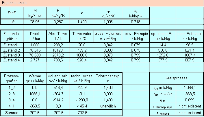 Dieselprozess Datentabelle